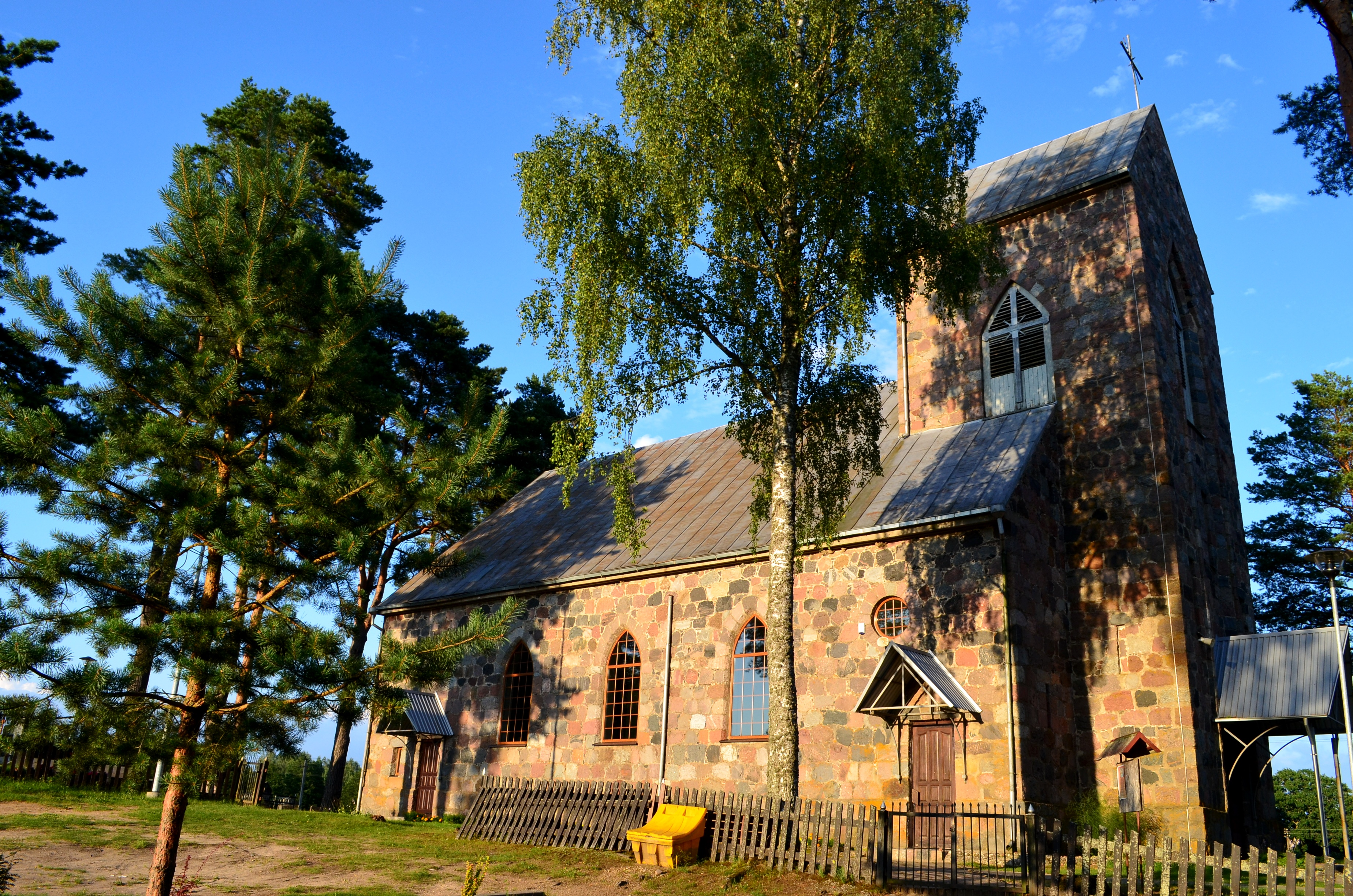 Stirnių bažnyčia, Stirnių k., Mindūnų sen., Molėtų raj.